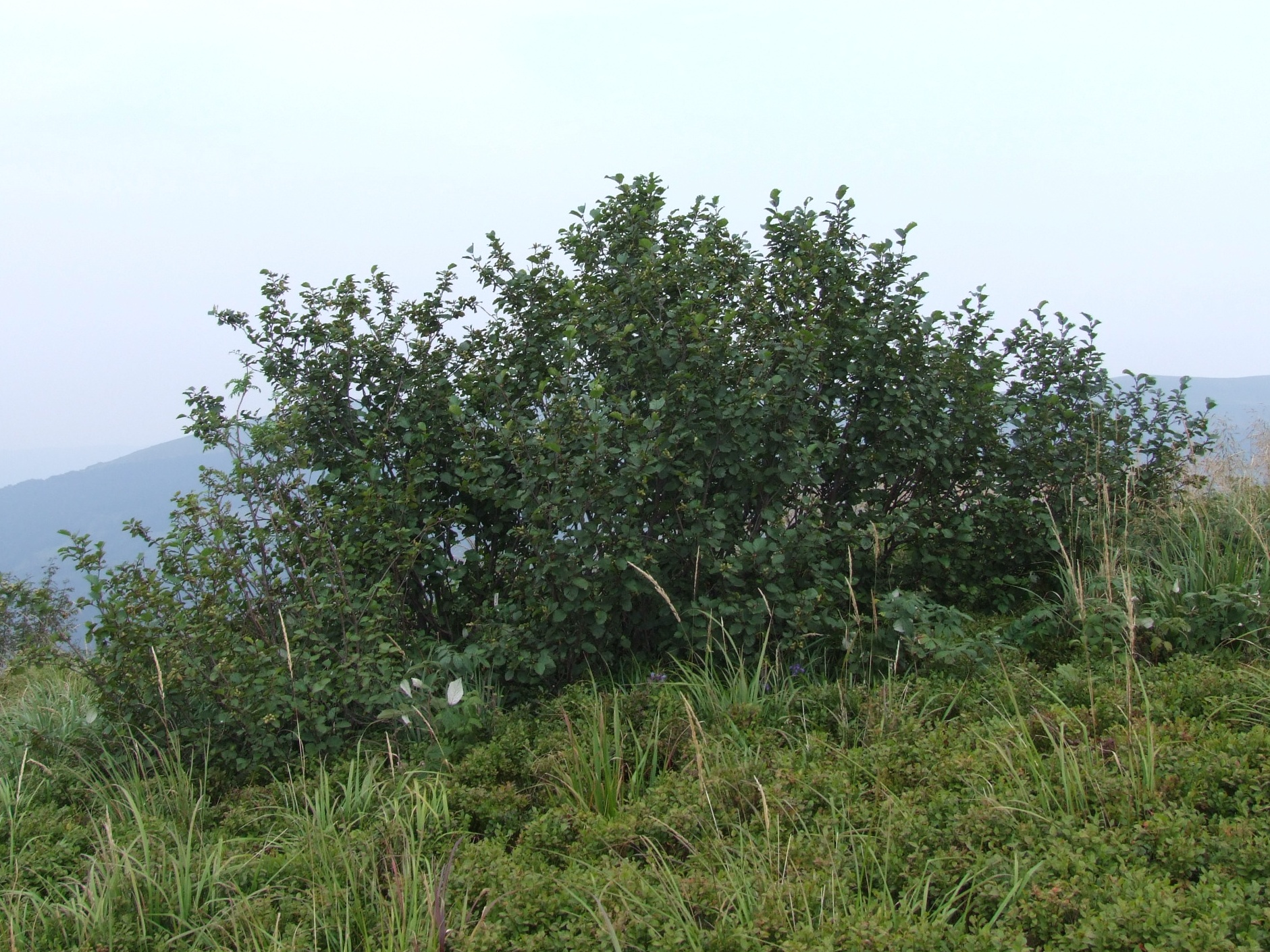 Alnus viridis. (habitat:Bieszczady)